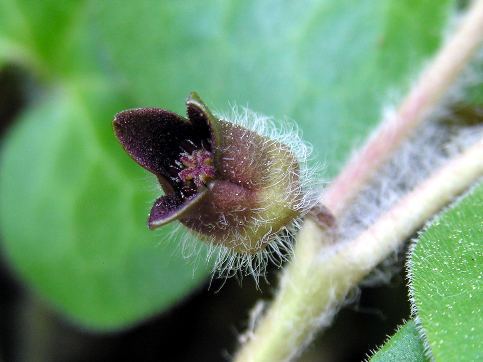 Europinės pipirlapės (Asarum europaeum) žiedas Šeima. Kartuoliniai (Aristolochiaceae) Fotografavo: Algirdas, 2006 m. gegužės 13 d., Lietuva.